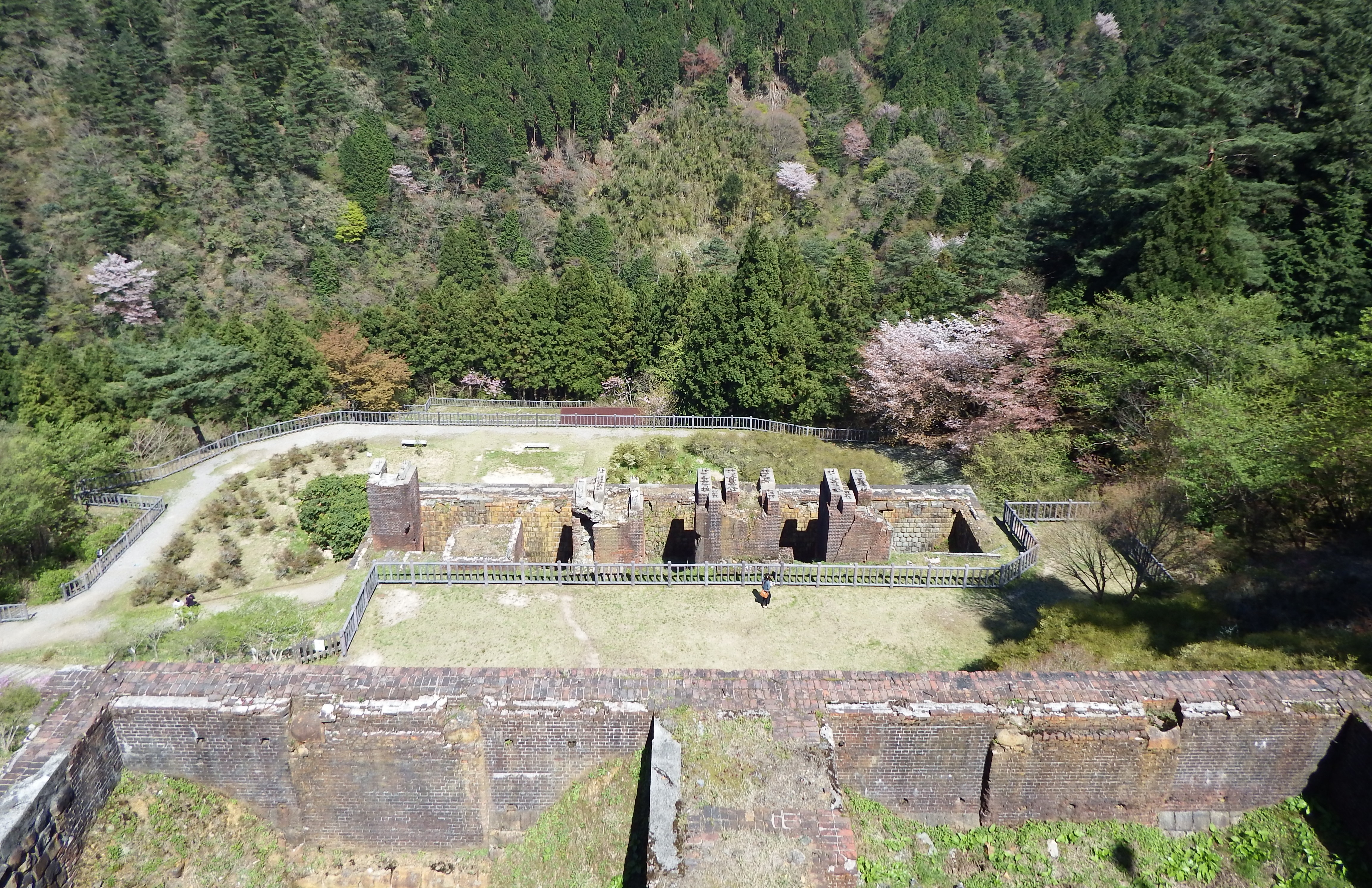 新居浜市の東平